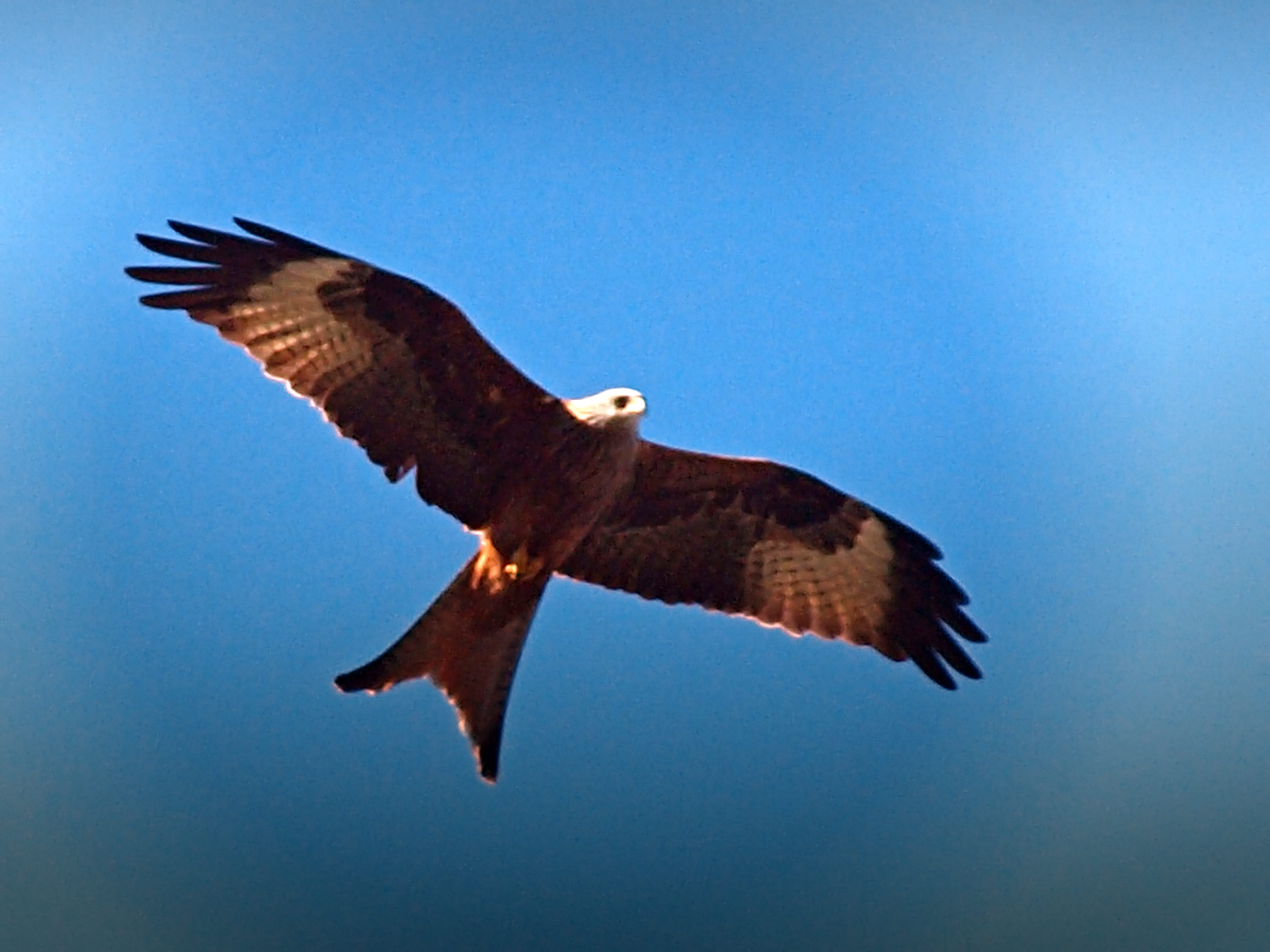 Costa (Corse) - Milan royal